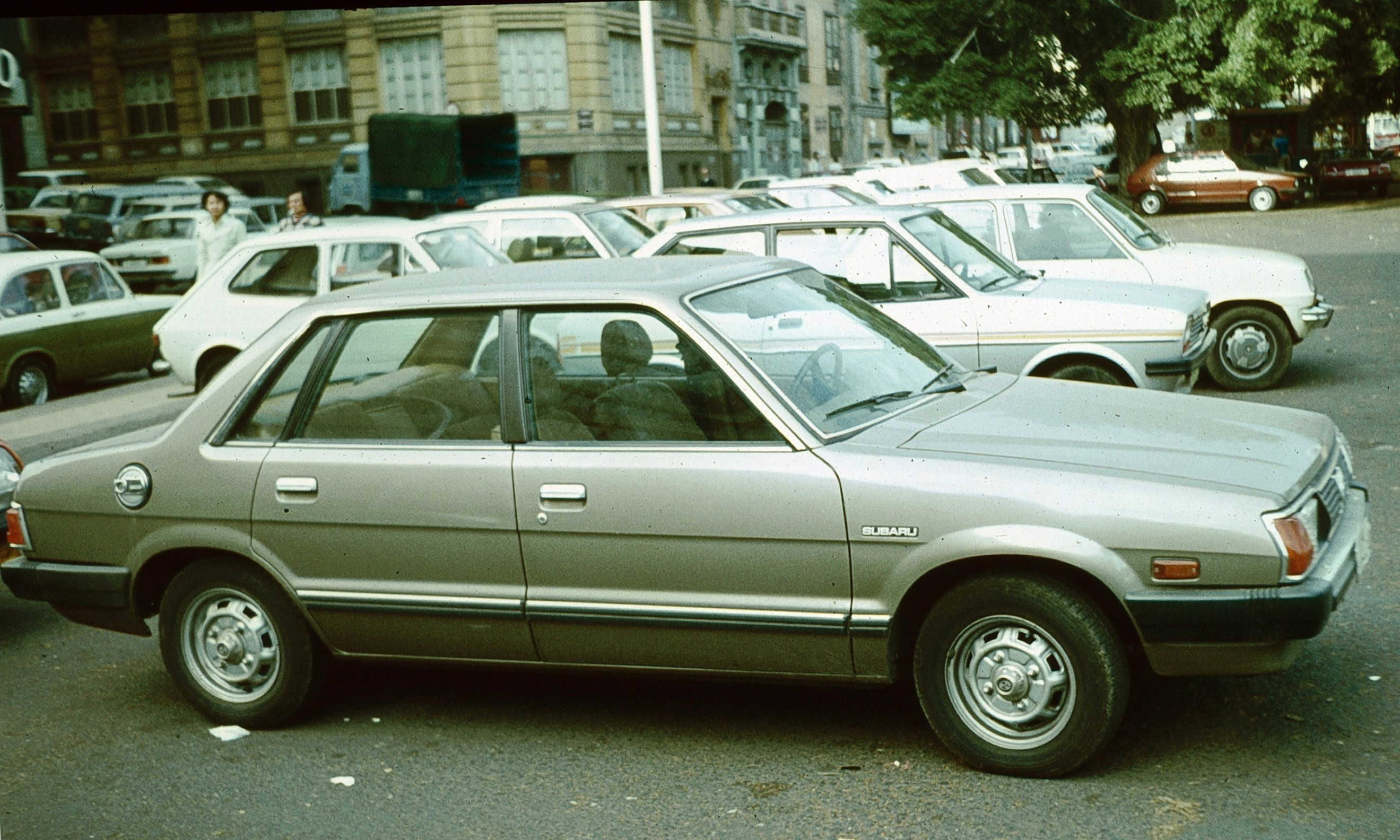 Subaru sedan Tenerife 1979